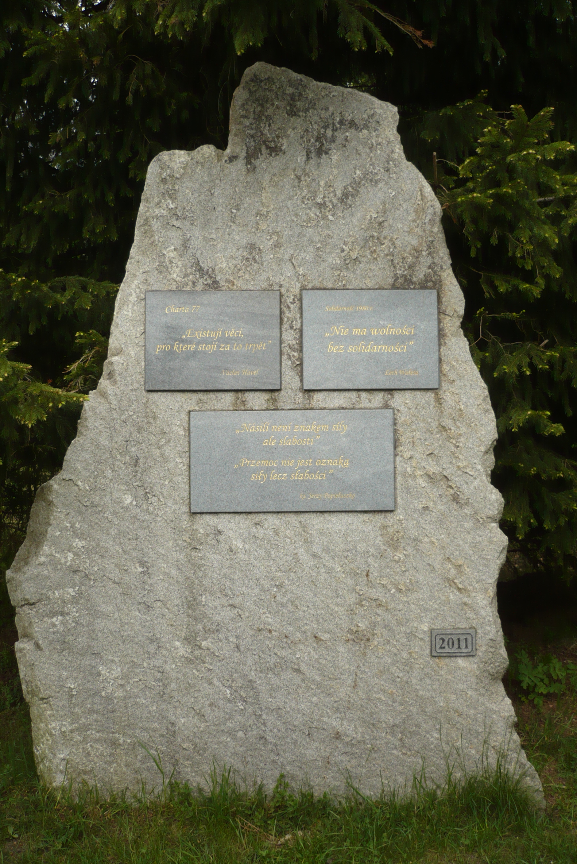 Borowkowa. Kamień